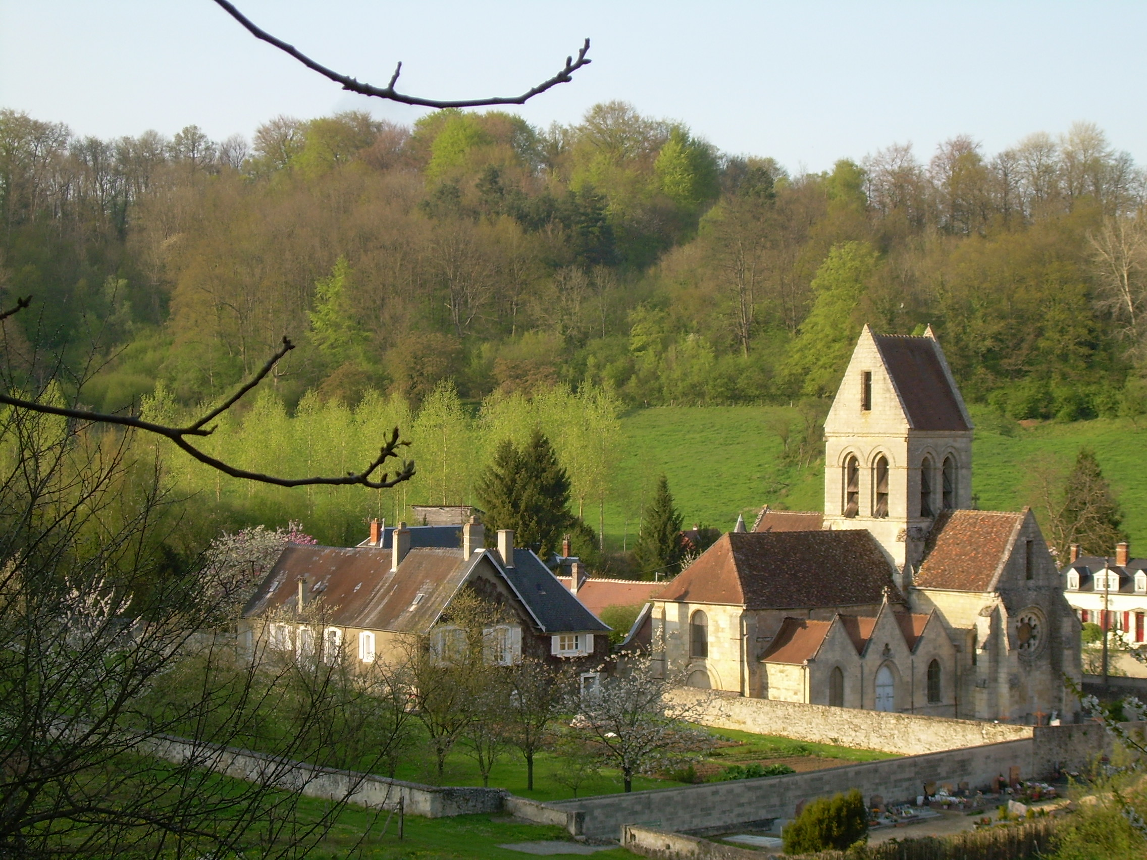 Chaillevois